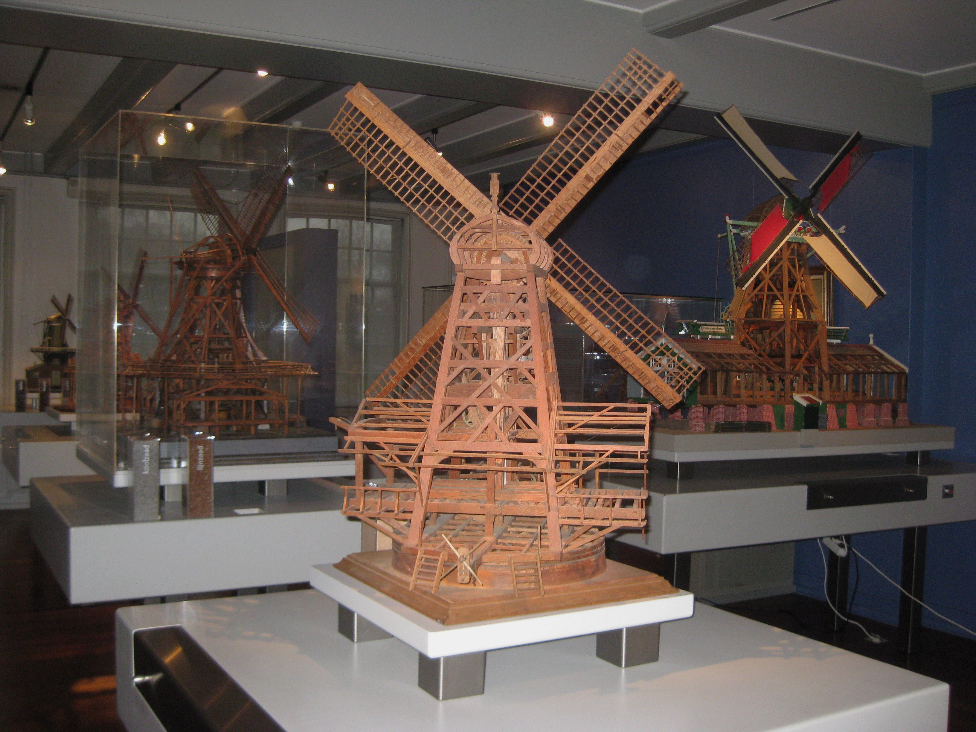 Interieur Molenmuseum Koog aan de Zaan